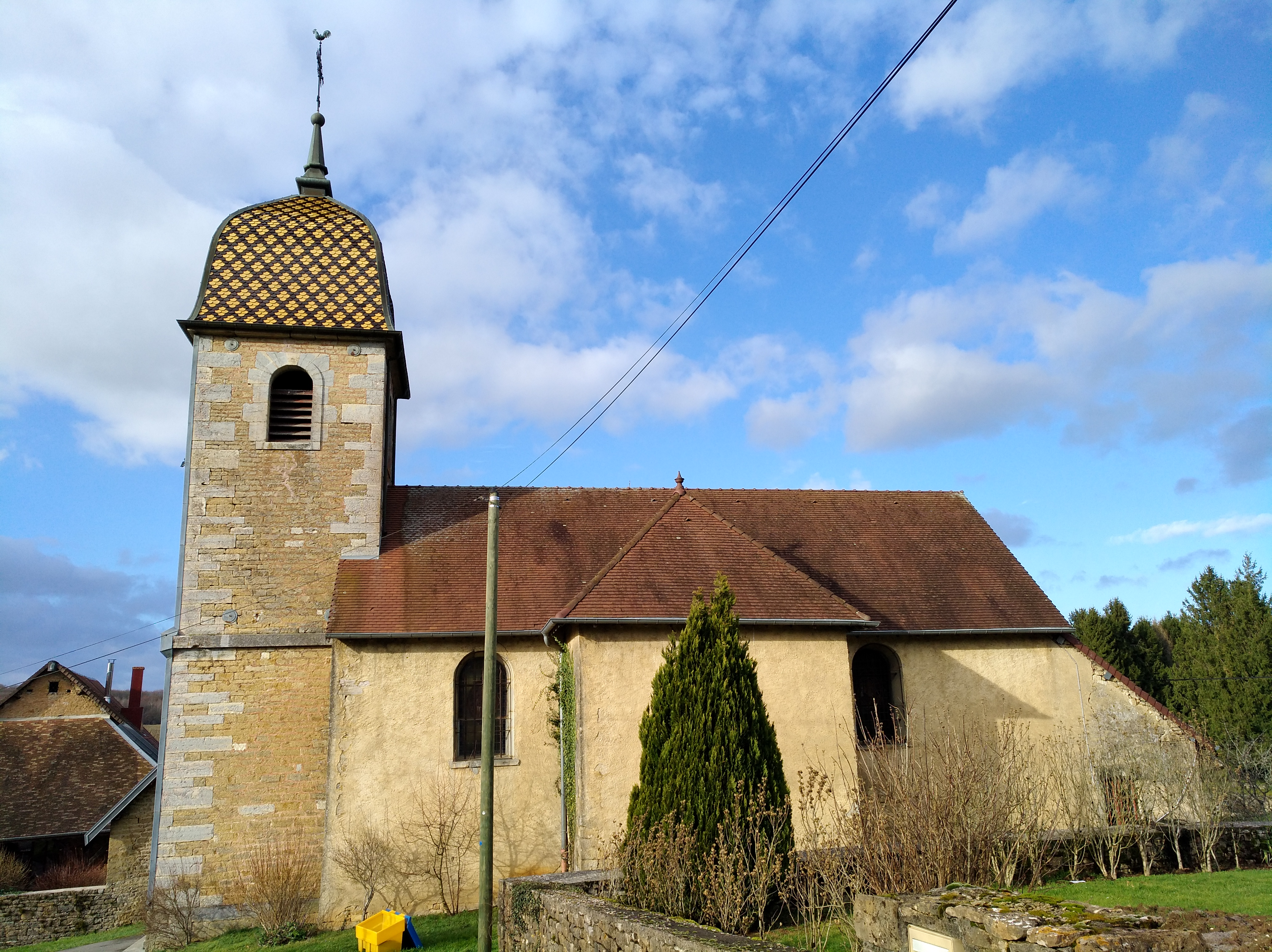 Ferrières-les-Bois (Doubs, France) en janvier 2018.